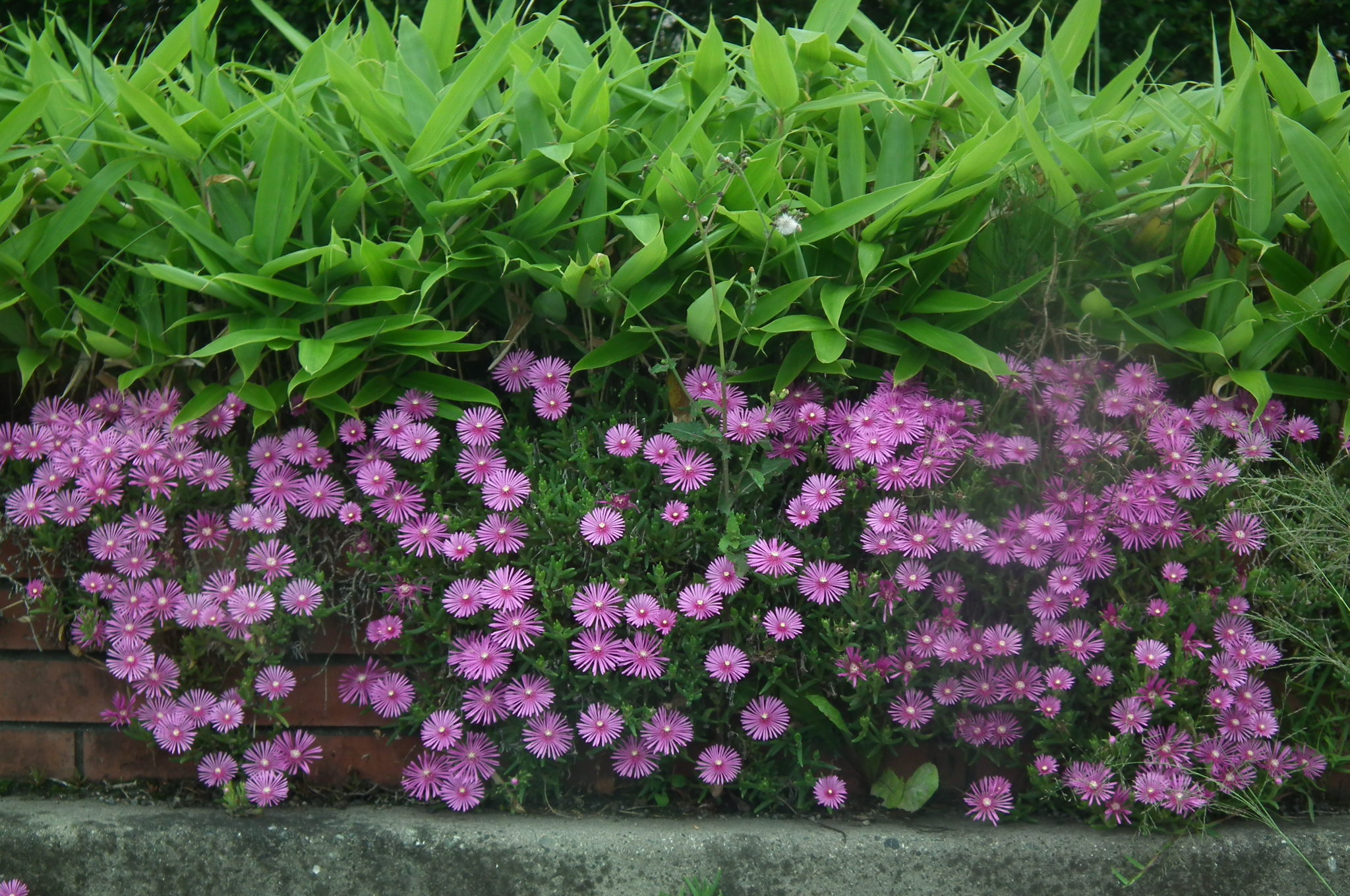 Lampranthus spectabilis マツバギク（松葉菊）・ササ